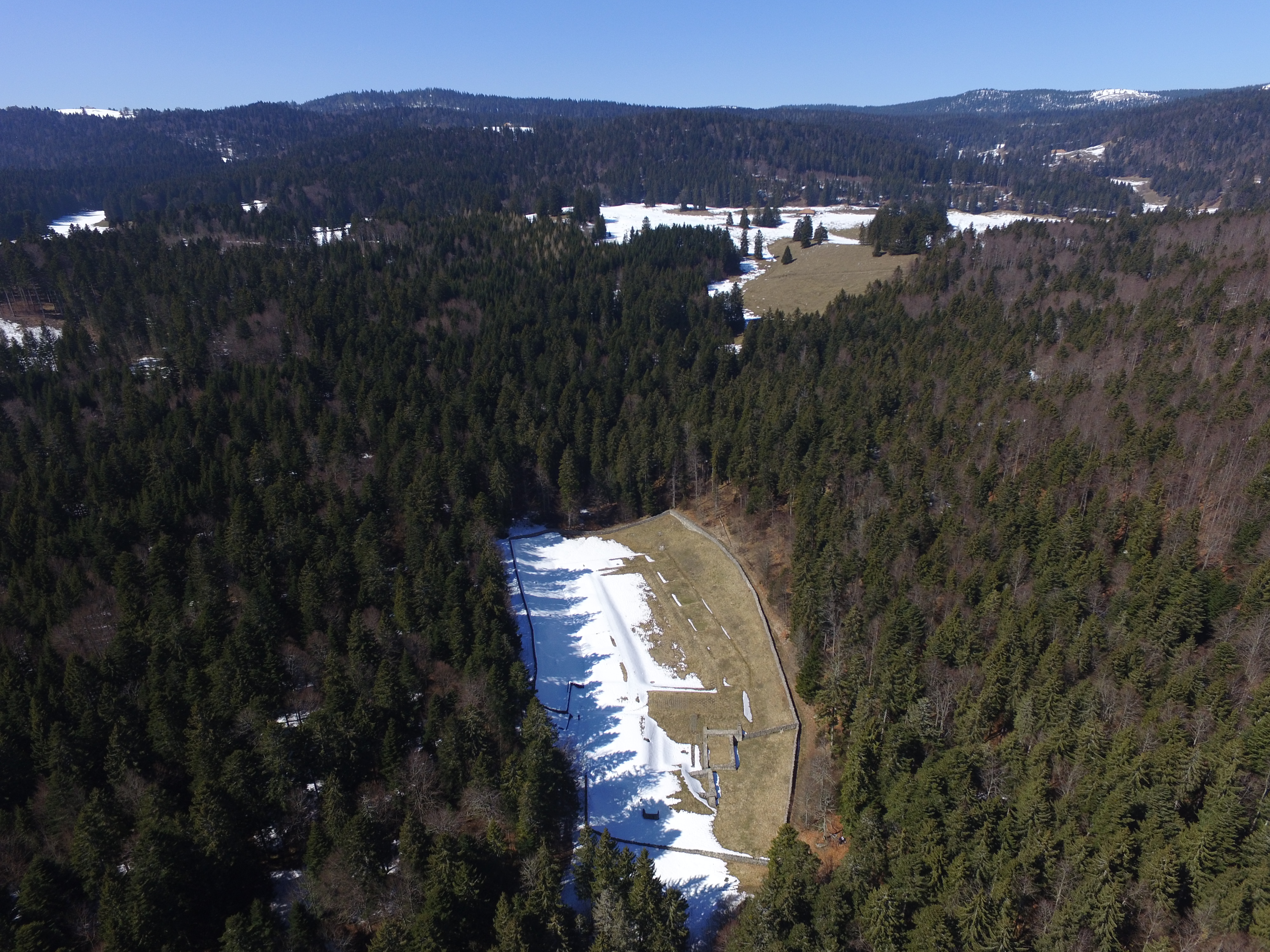 Chartreuse d'Oujon, vue aérienne